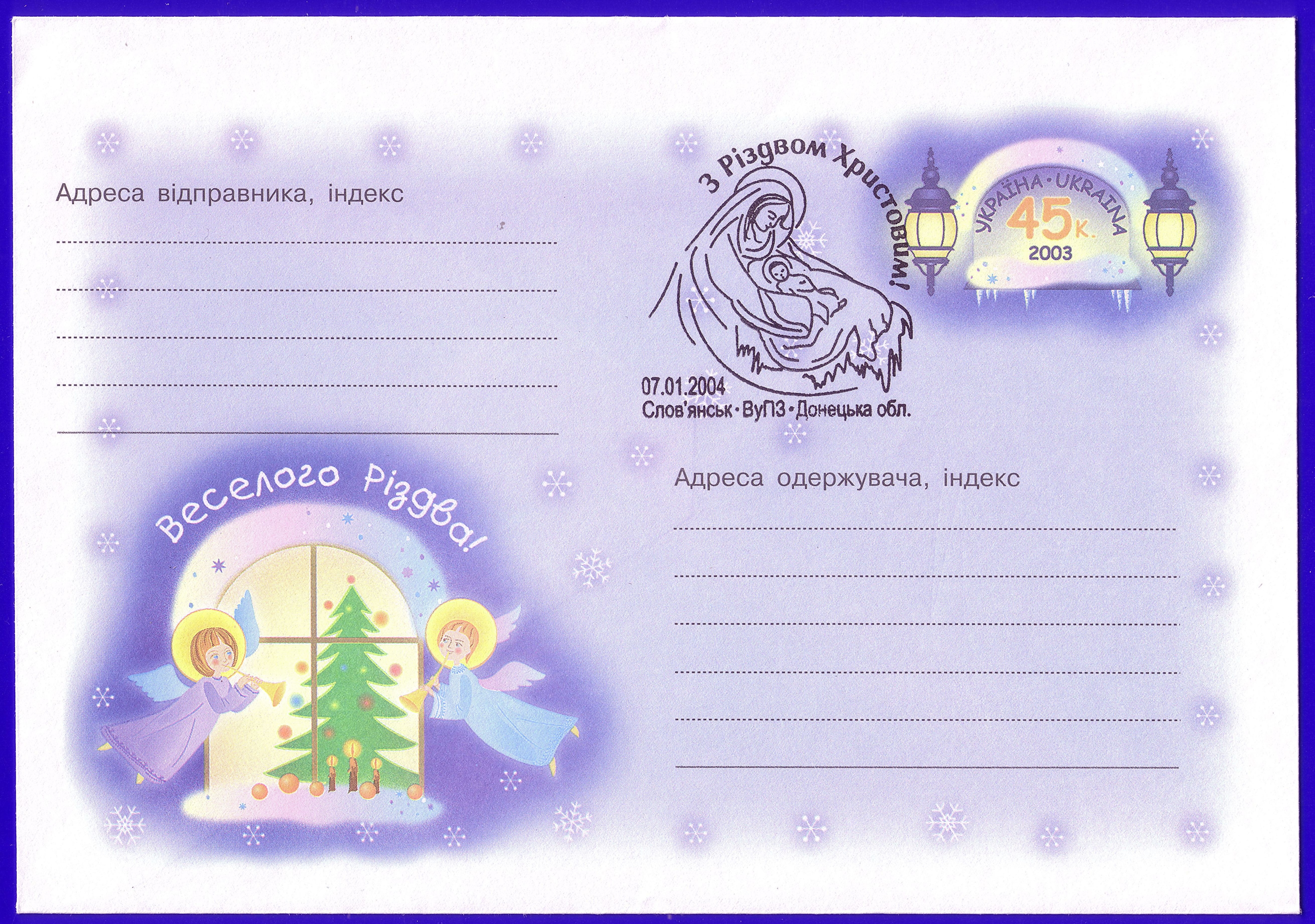 Весёлого Рождества! Спецгашение на православное Рождество 7 января (по православному календарю) 2004 в Славянске. Конверт с оригинальной маркой номиналом 45 украинских копеек, выпущен 26.09.2003.